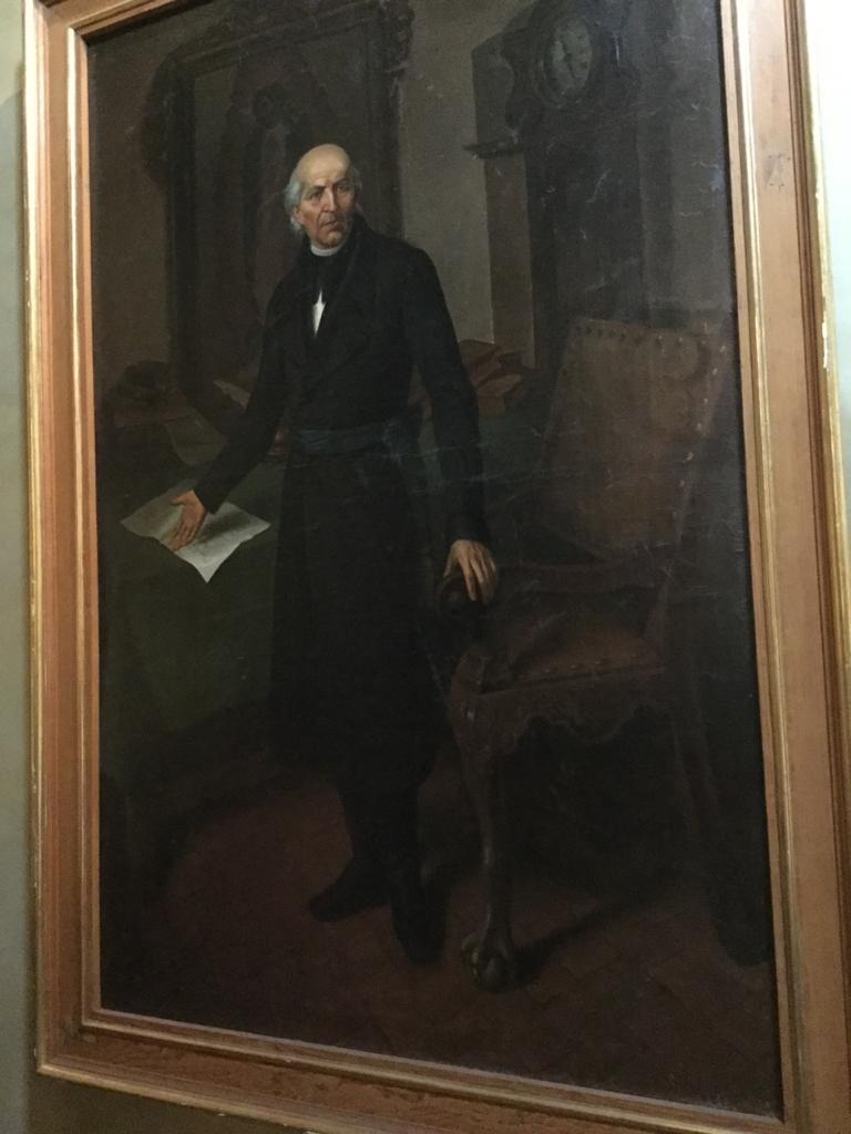 Pintura en óleo de Miguel Hidalgo y Costilla, hecha el 4 de mayo de 1883, que se encuentra en el Museo Regional de Santiago de Querétaro.